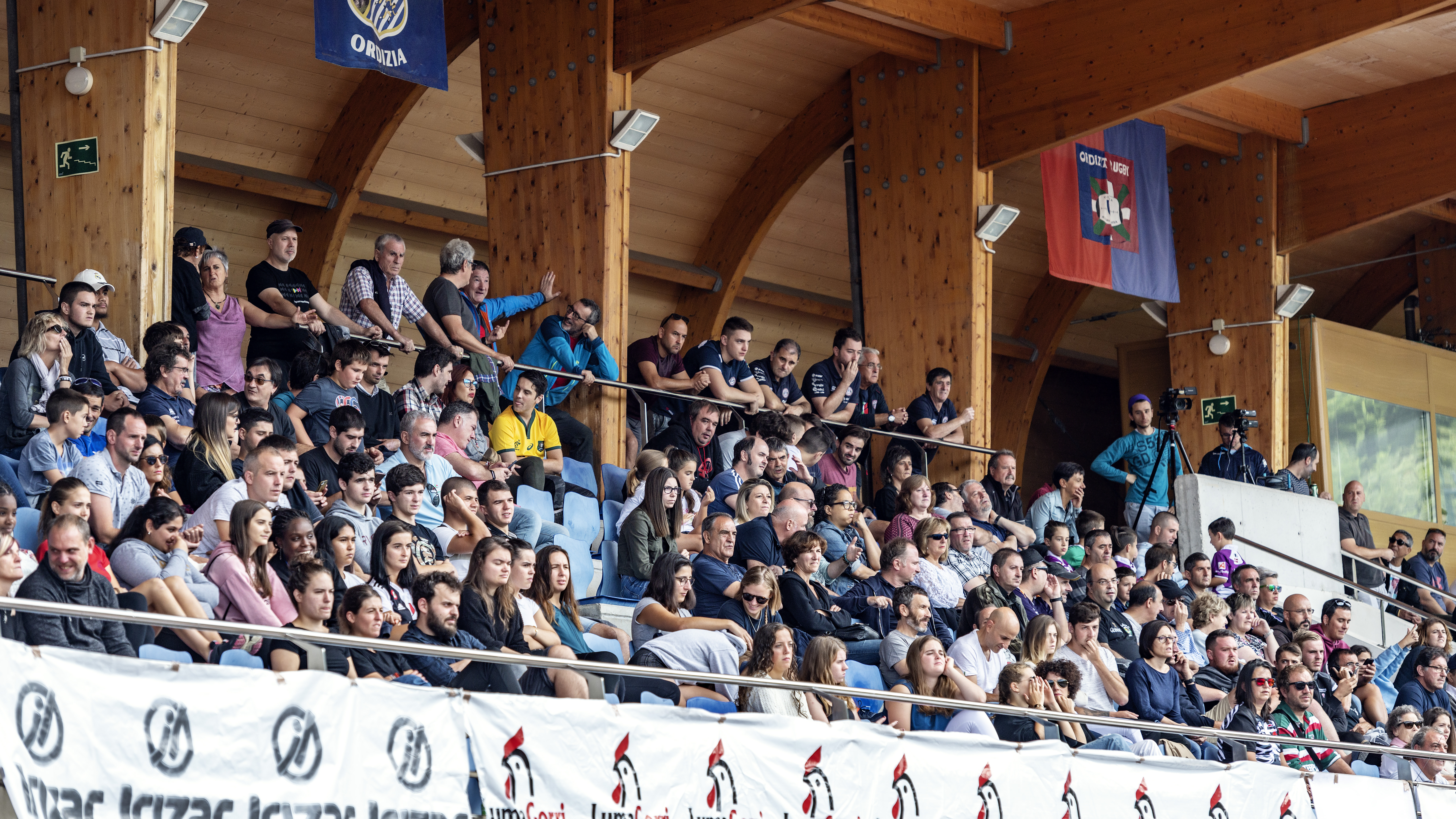 Aviron Bayonnais izan da Euro Basque Rugby Challenge-Euskal Errugbi Ligaren lehen txapelduna